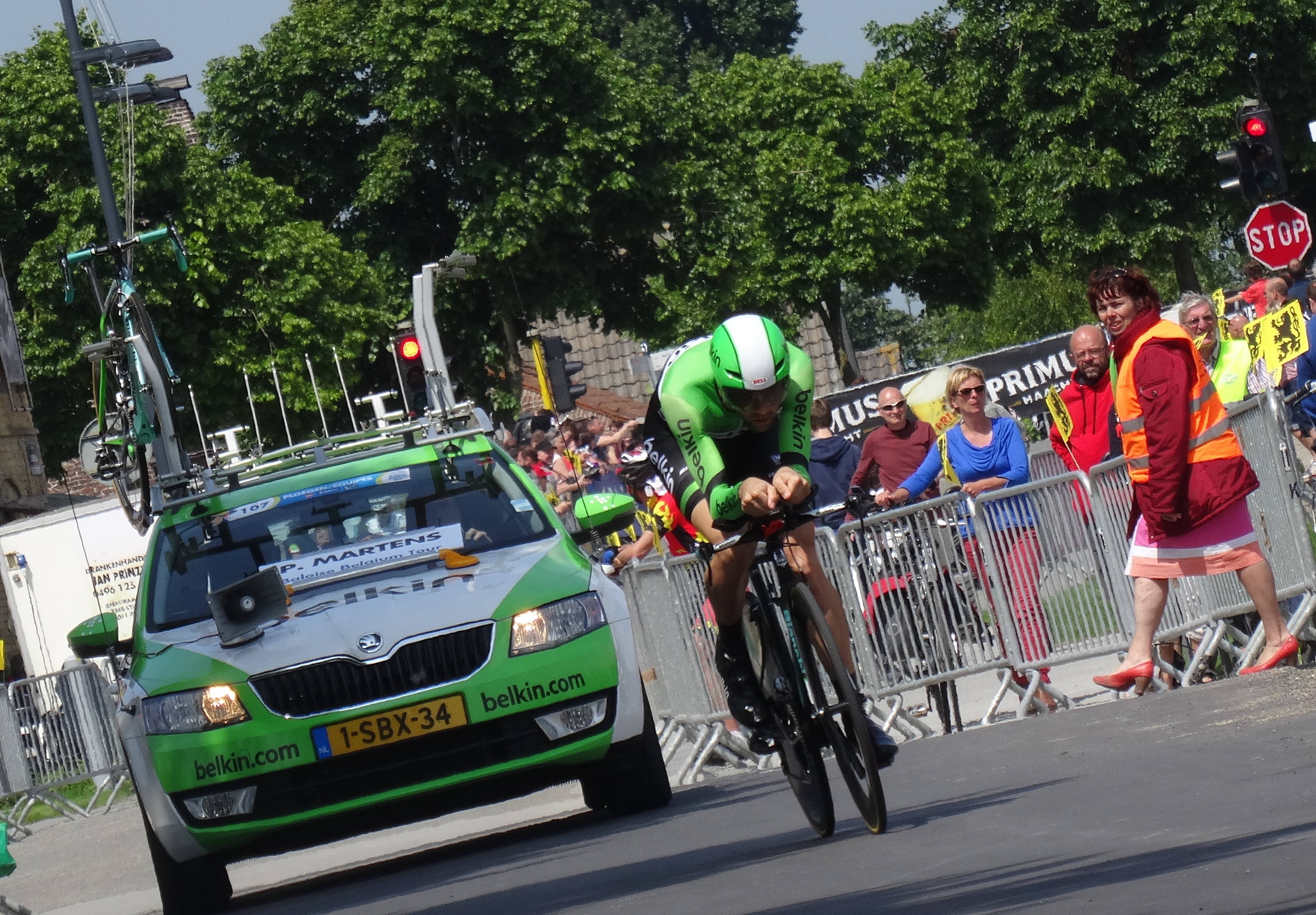 Reportage photographique réalisé le vendredi 30 mai à l'occasion du contre-la-montre individuel de la troisième étape du Tour de Belgique 2014 à Dixmude, Belgique.